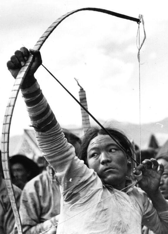 Gyantse, Bogenschießen